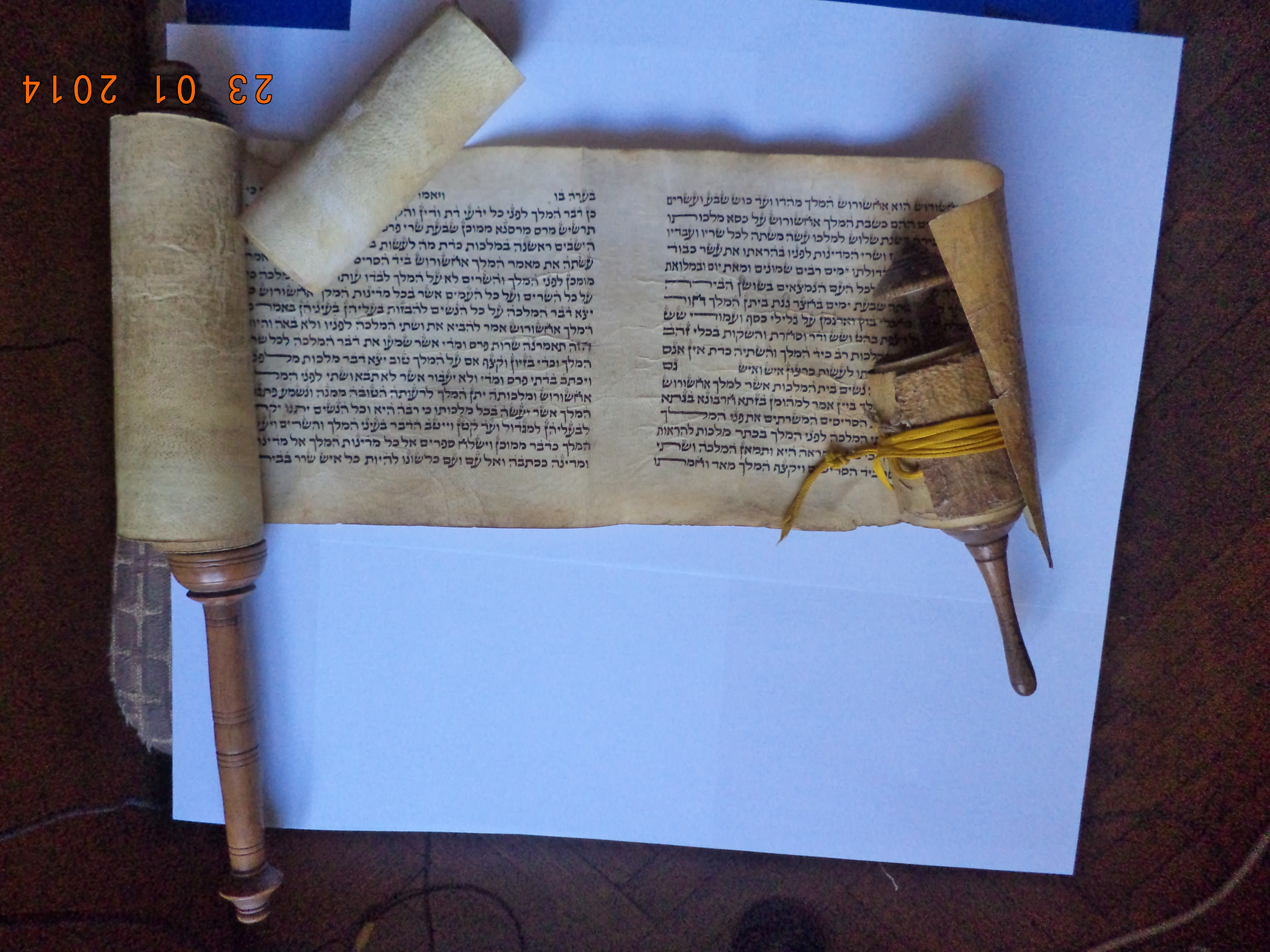 Ръкописни свитъци на книгата "Естир" от архива на НБКМ с инвентарни номера НБКМ 3/987, НБКМ 3/984, НБКМ 3/995